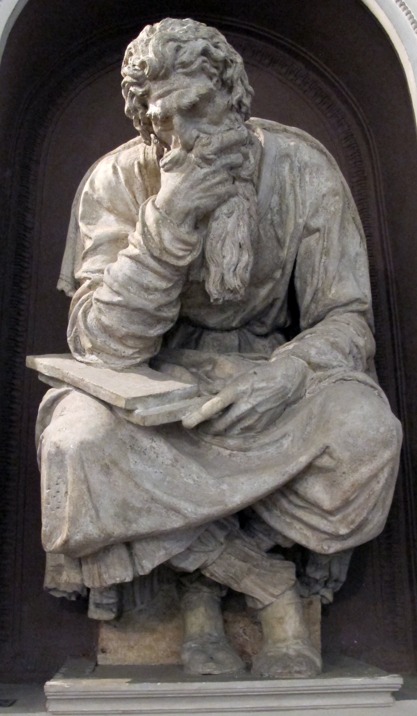 Lasta della tomba comune degli asrtisti nella Cappella di San Luca alla Santissima Annunziata, Firenze, opera del Montorsoli. Qui vennero sepolti numerosi artisti, da Pontormo al Cellini, dallo stesso Montorsoli a Andrea Sansovino. L'ultimo fu Lorenzo Bartolini nel 1848